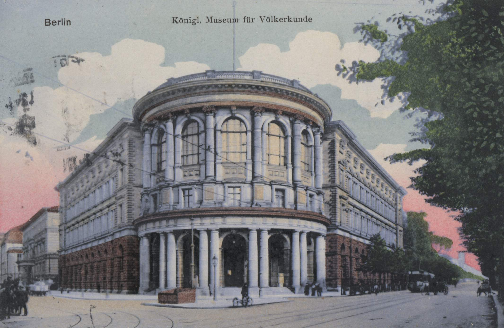 Museum für Völkerkunde (heute Ethnologisches Museum, südliche Ecke Königgrätzer Straße (heute Stresemannstraße) / Prinz-Albrecht-Straße (heute Niederkirchnerstraße an der Grenze Berlin-Kreuzberg und Berlin-Mitte. Das 1886 eröffnete Gebäude wurde im Zweiten Weltkrieg zerstört. 1961 wurde die Ruine gesprengt. Das bis heute brachliegende Grundstück lag direkt an der Berliner Mauer. Das Museum wurde in Berlin-Dahlem wieder eröffnet. 1999 erhielt es seinen neuen Namen.